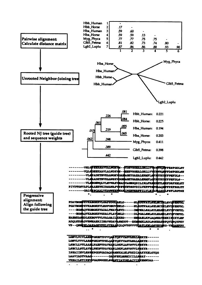 Základní metoda z roku 1994 (Thompson, 1994). Jako zdrojová data 7 globinů známé terciární struktury (názvy z databáze Swiss Prot): Hba_Horse: horse ca-globin; Hba-Human: human ca-globin; Hbb_Horse: horse 3-globin; HbbHuman: human ,B-globin; Myg.Phyca: sperm whale myoglobin; Glb5.Petma: lamprey cyanohaemoglobin; Lgb2_Luplu: lupin leghaemoglobin.